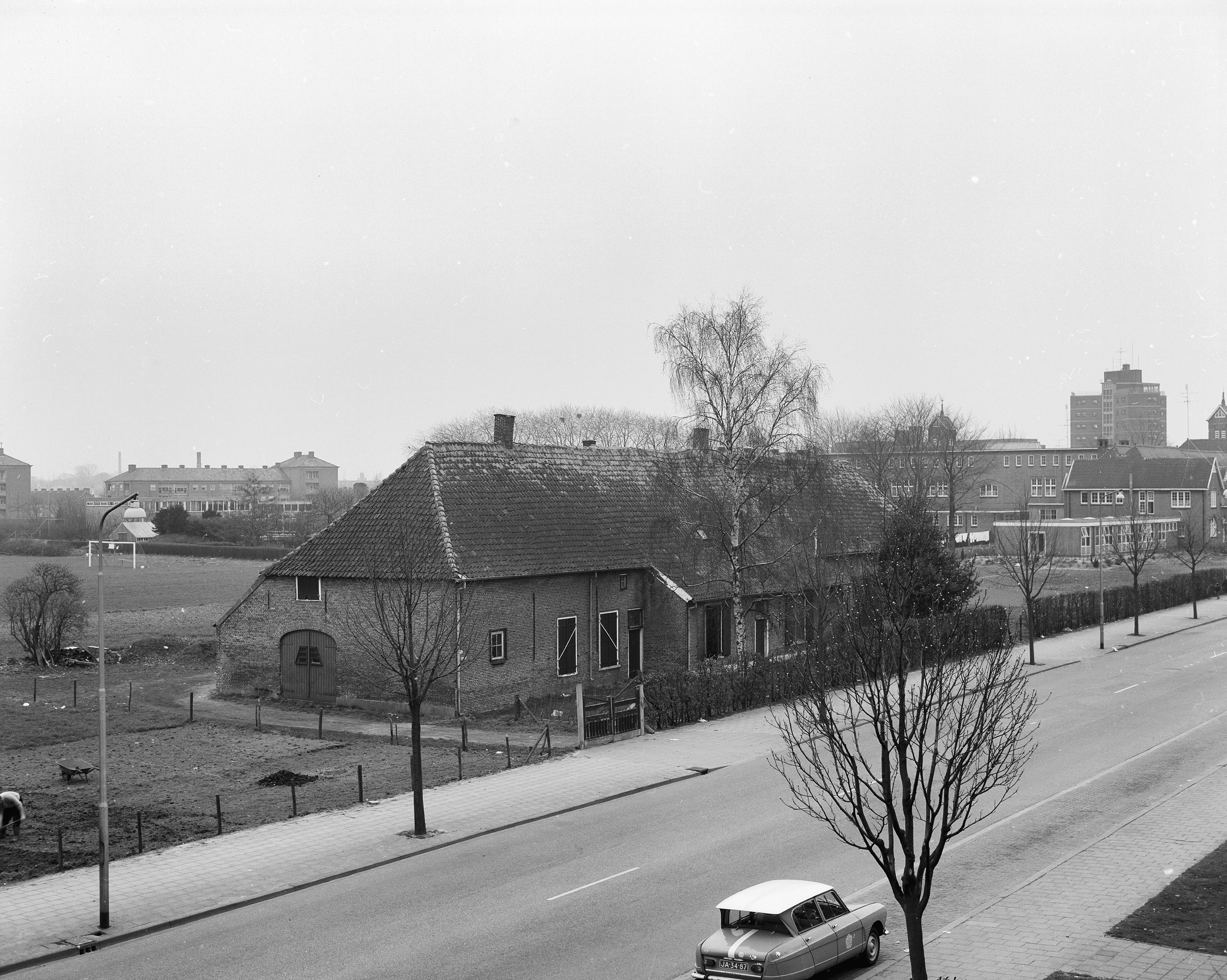 "De oliemolen"